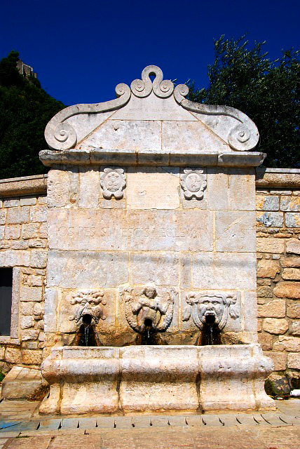 Wikipedia: San Lupo.